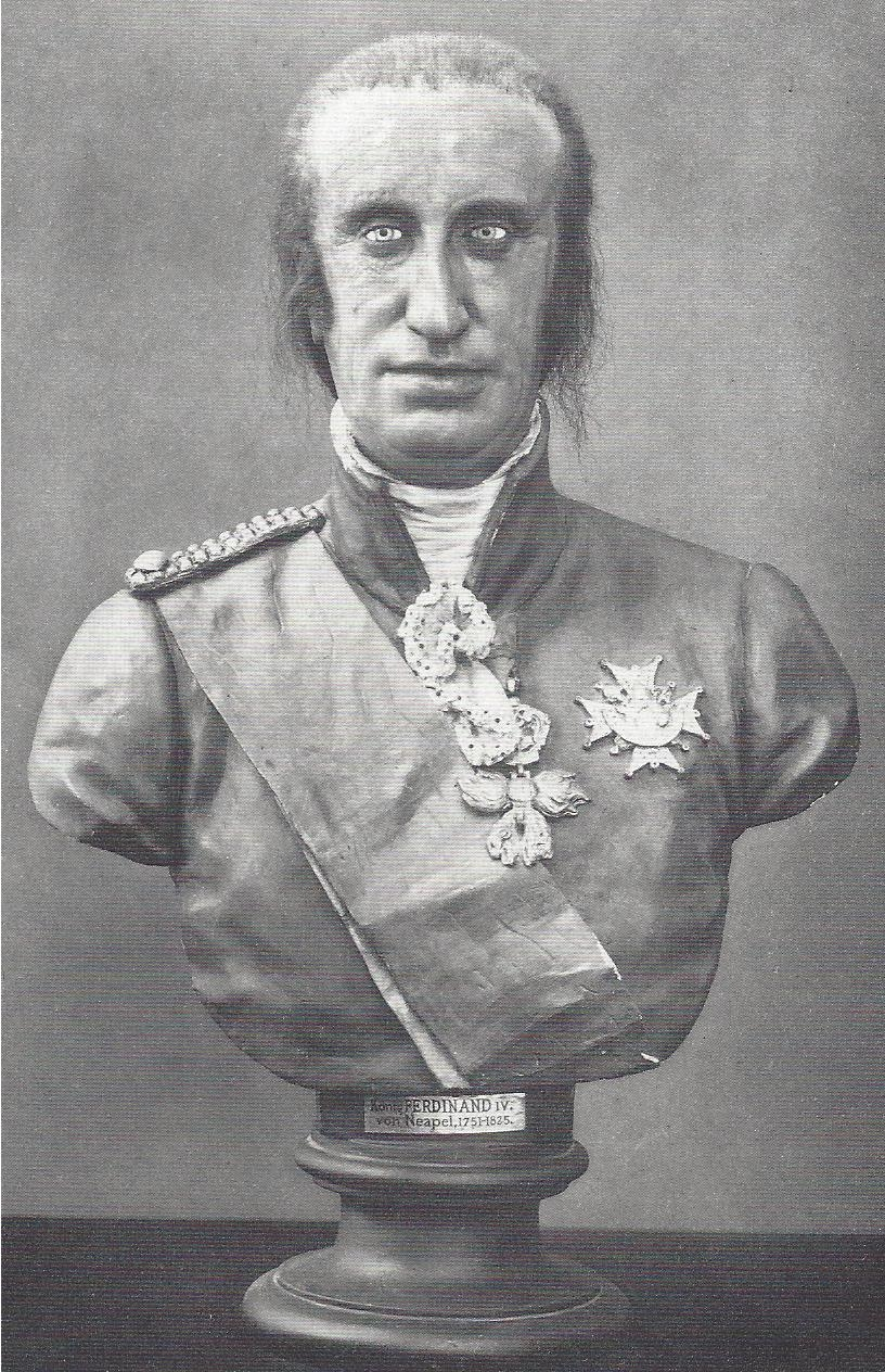 Porträtbüste